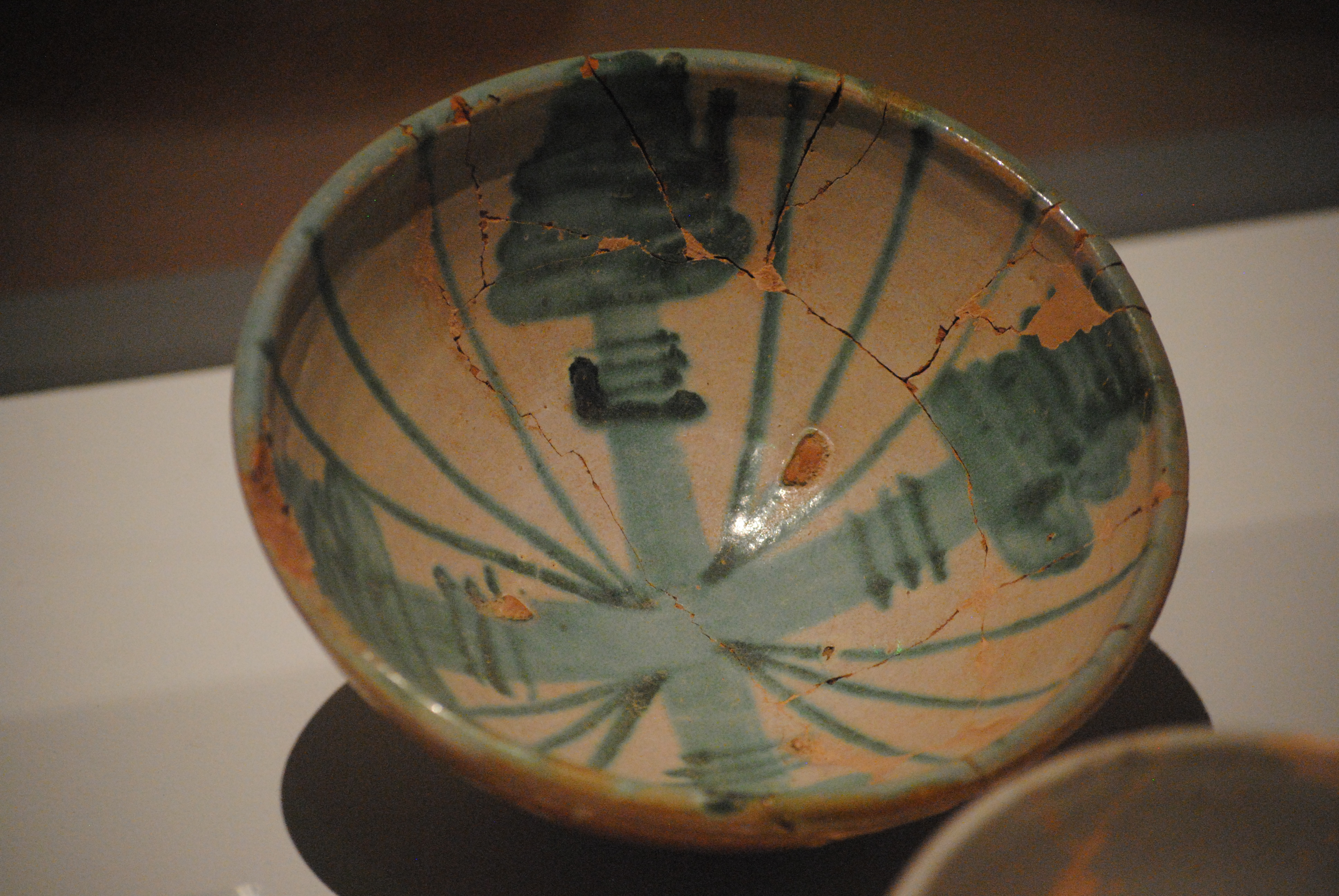 Ciotola in maiolica arcaica prodotta a Pisa nel XV secolo (San Michele alla Verruca, Vicopisano - Pisa) - Museo Nazionale di San Matteo.